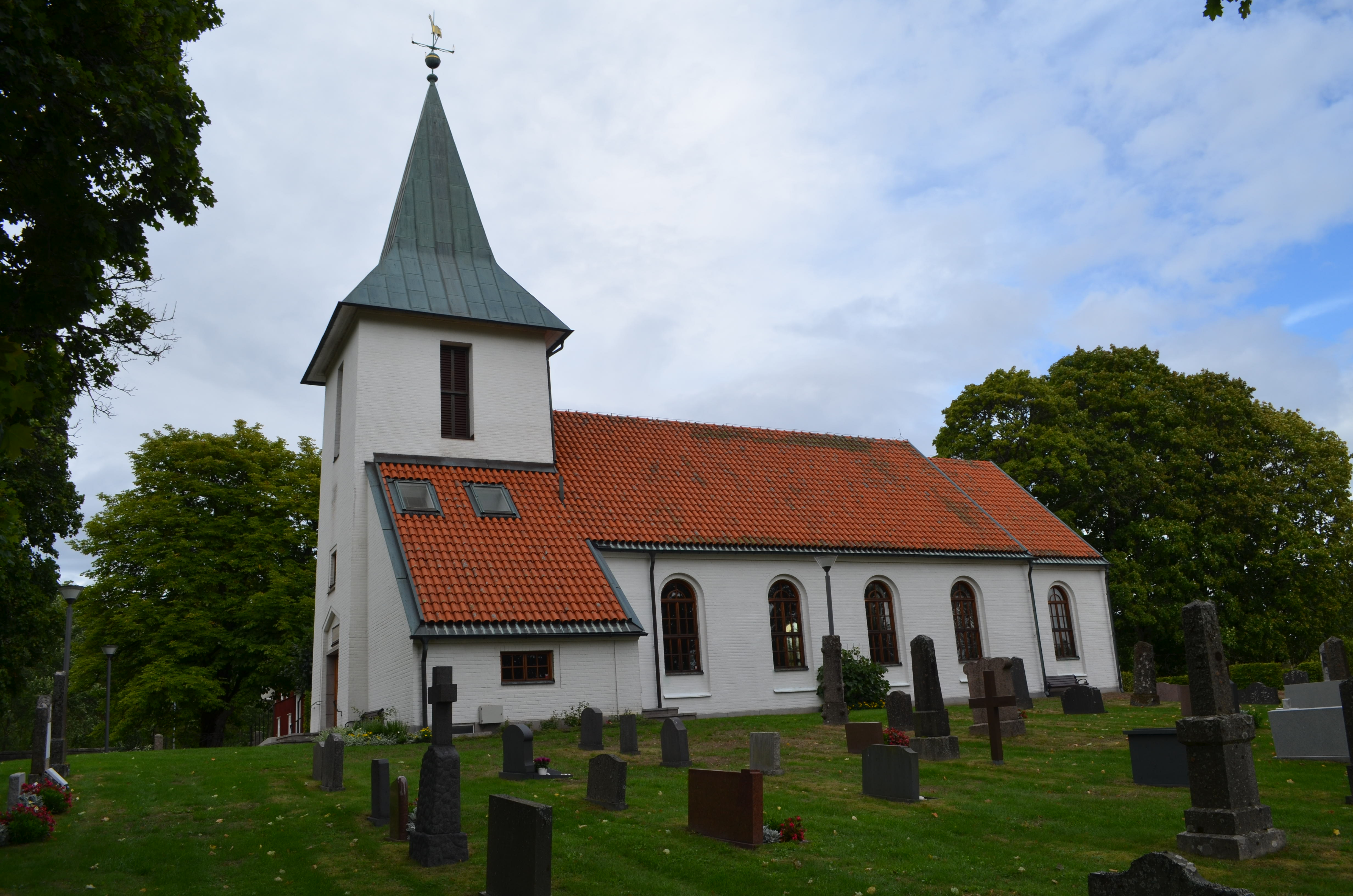 Bosebo kyrka 2018